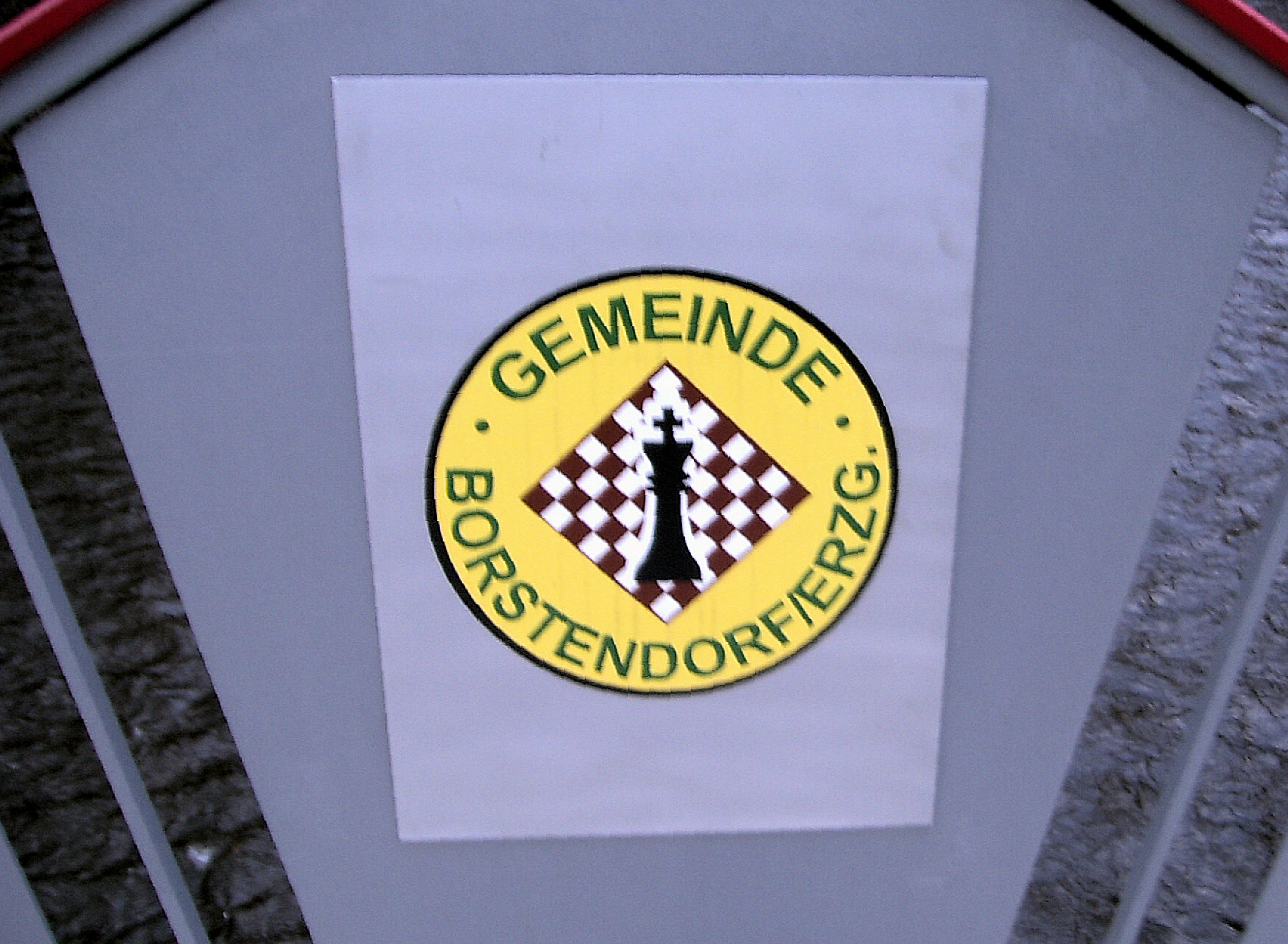 Wappenbild der Gemeinde Borstendorf an der Flöhabrücke